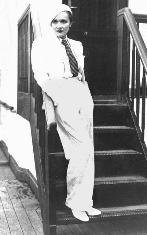 Marlene Dietrich, die bekannte Filmschauspielerin, welche sich augenblicklich in Paris aufhält, wurde von dem Polizeipräfekten von Paris, Chiappe, unter Androhung der Verhaftung, verboten sich öffentlich in Männerkleidern zu zeigen! Marlene Dietrich bei ihrer Ankunft in Europa in Männerkleidern. Information added by Wikimedia users.depicted person: Marlene Dietrich (age: 31)